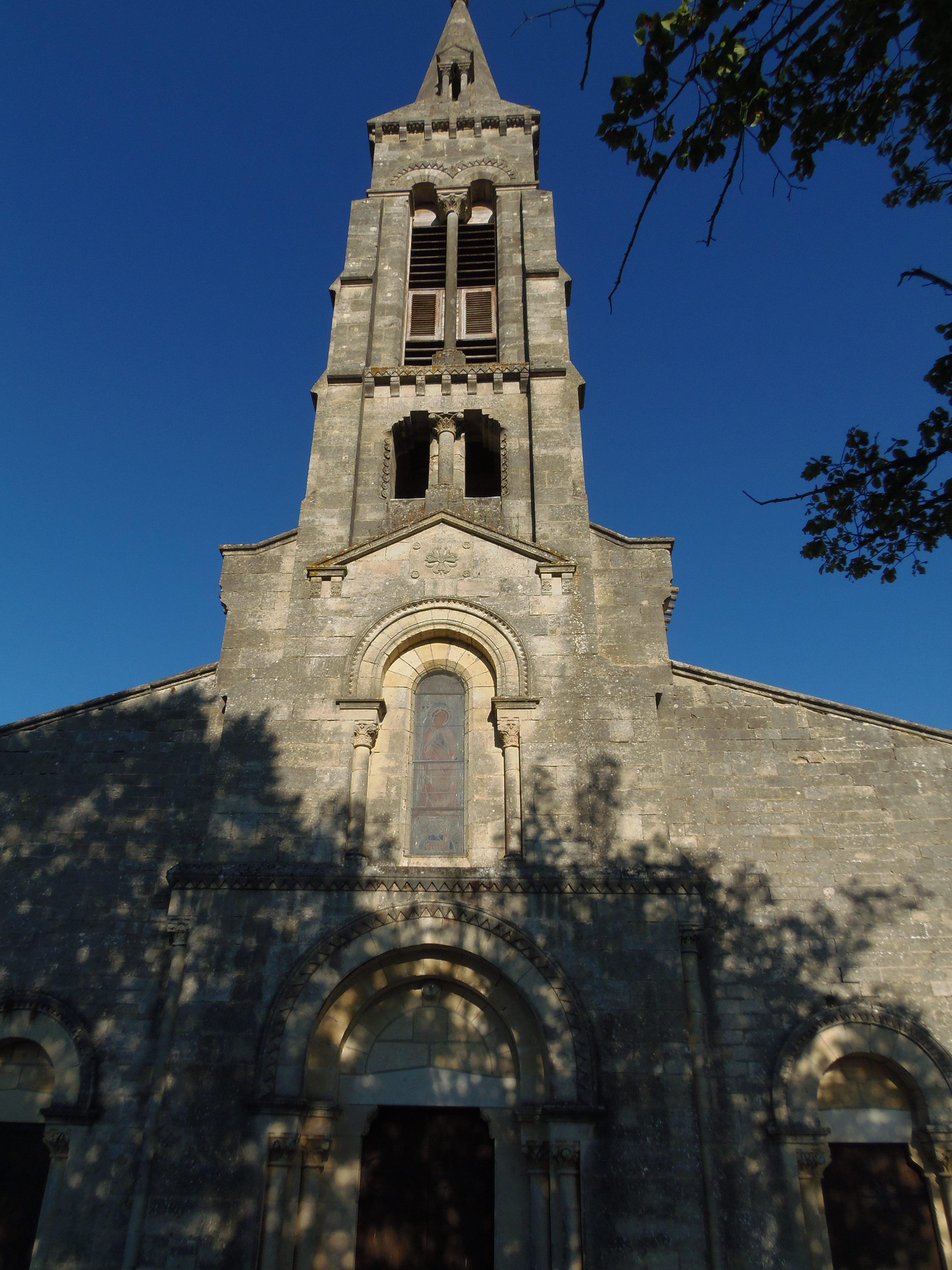 Vue de face